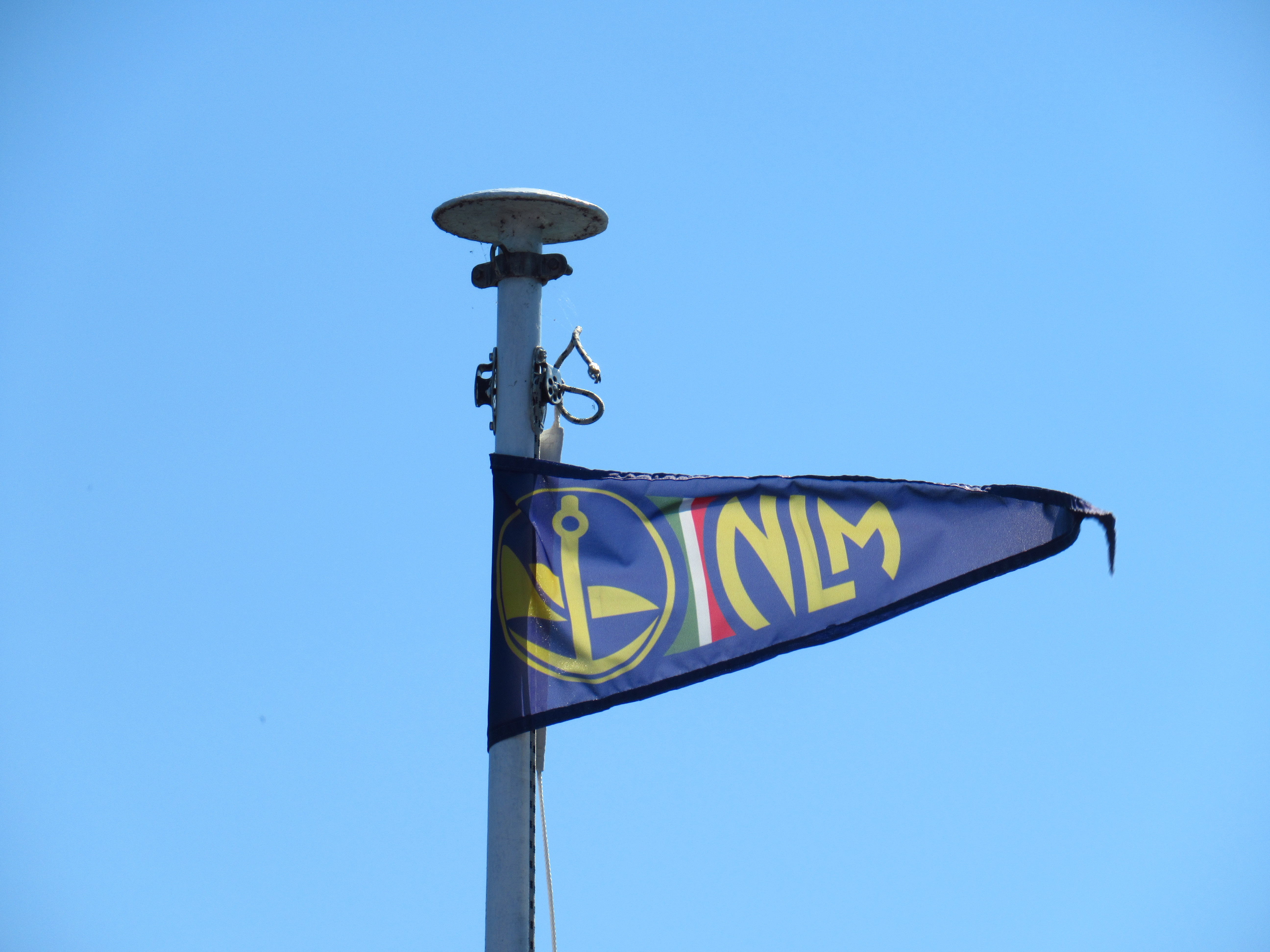 Bandiera della Navigazione Lago Maggiore sulla motonave Daino